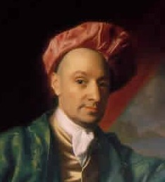 Václav Josef Bartoloměj Praupner (1745 - 1807), Český hudební skladatel.